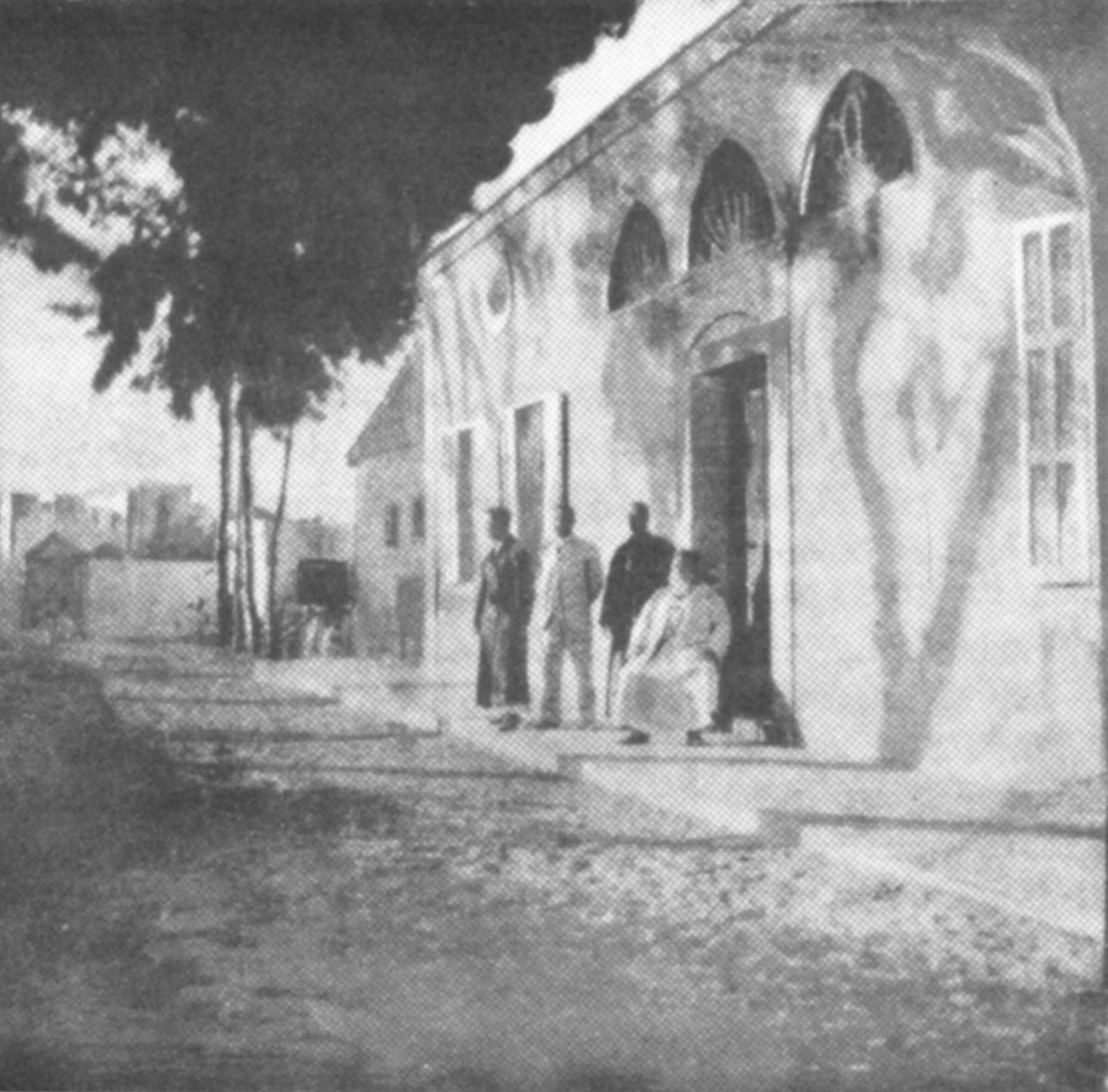 בית אהרן שלוש - לפני הוספת הקומה השנייה